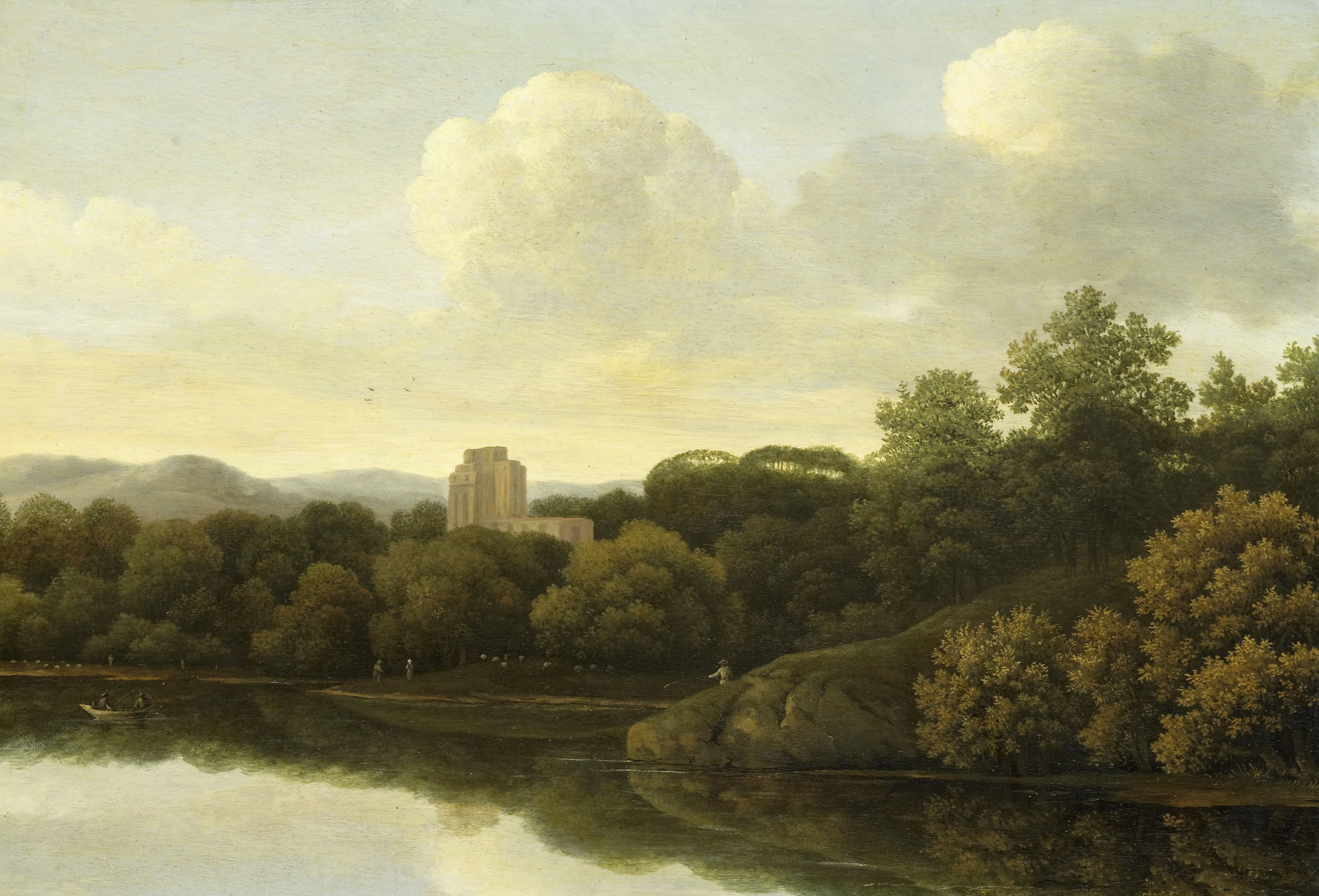 Boslandschap met rivier op de voorgrond. Aan de oever rechts staat een hengelaar, verderop herders met schapen. Tussen de bomen de ruïne van een kasteel.